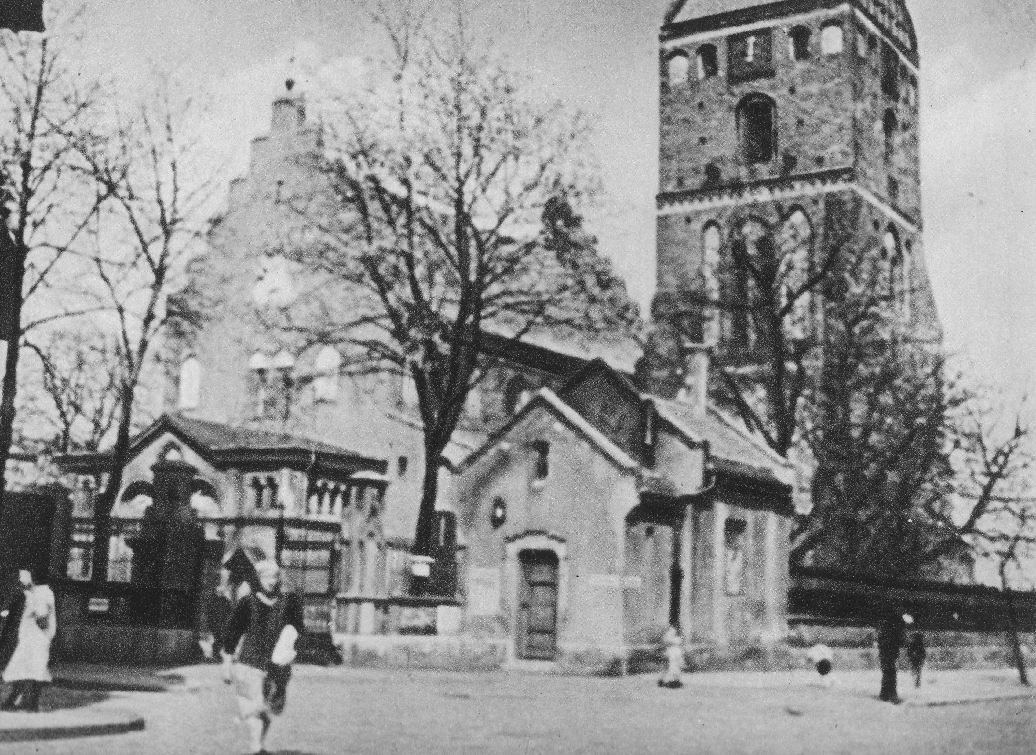 Kościół Nawiedzenia Najświętszej Marii Panny w Warszawie